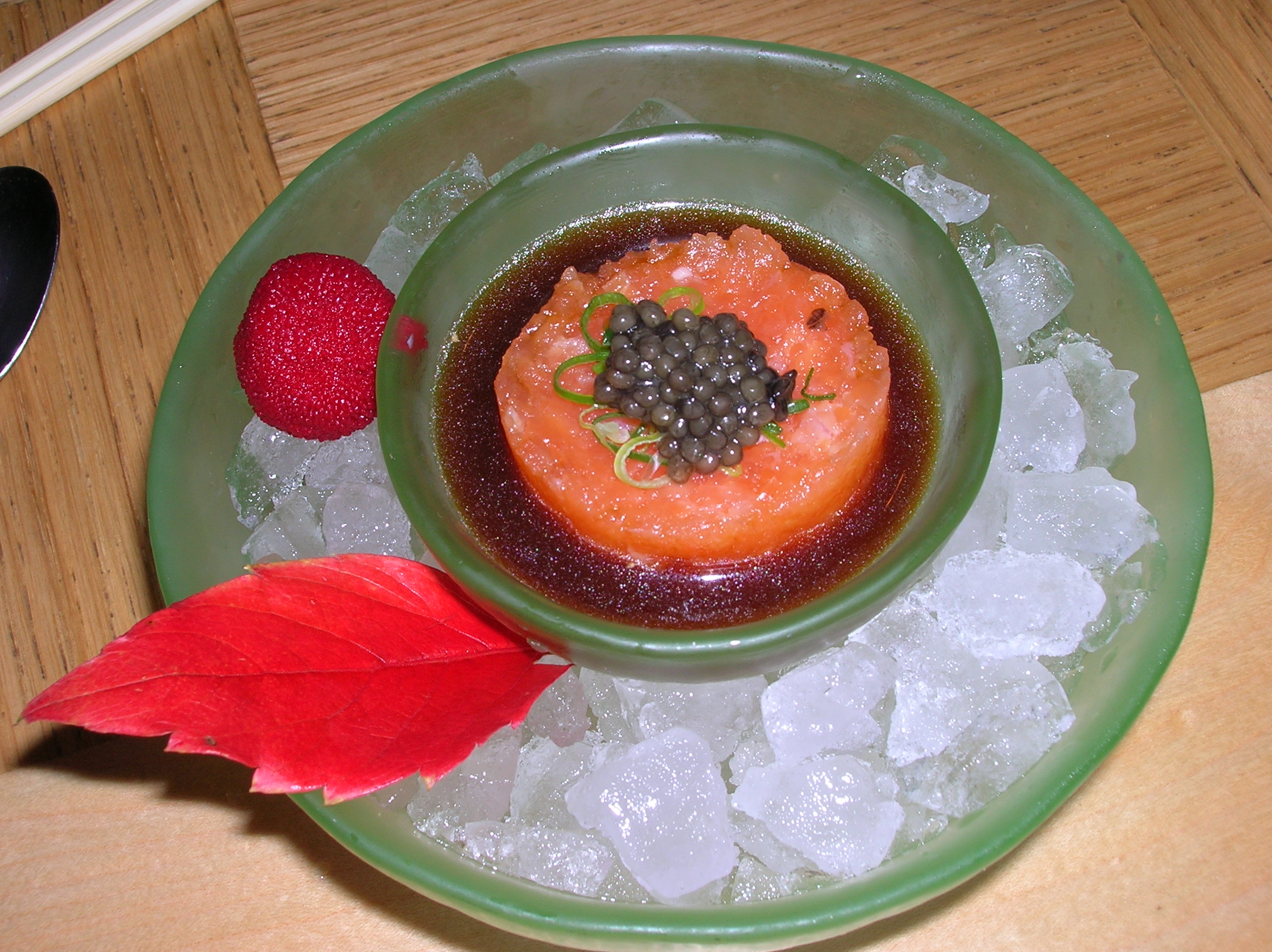 טרטר סלמון עם אוסטרה קוויאר